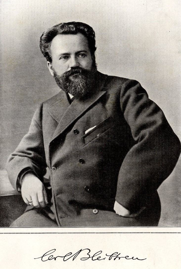 Carl Bleibtreu, 1909